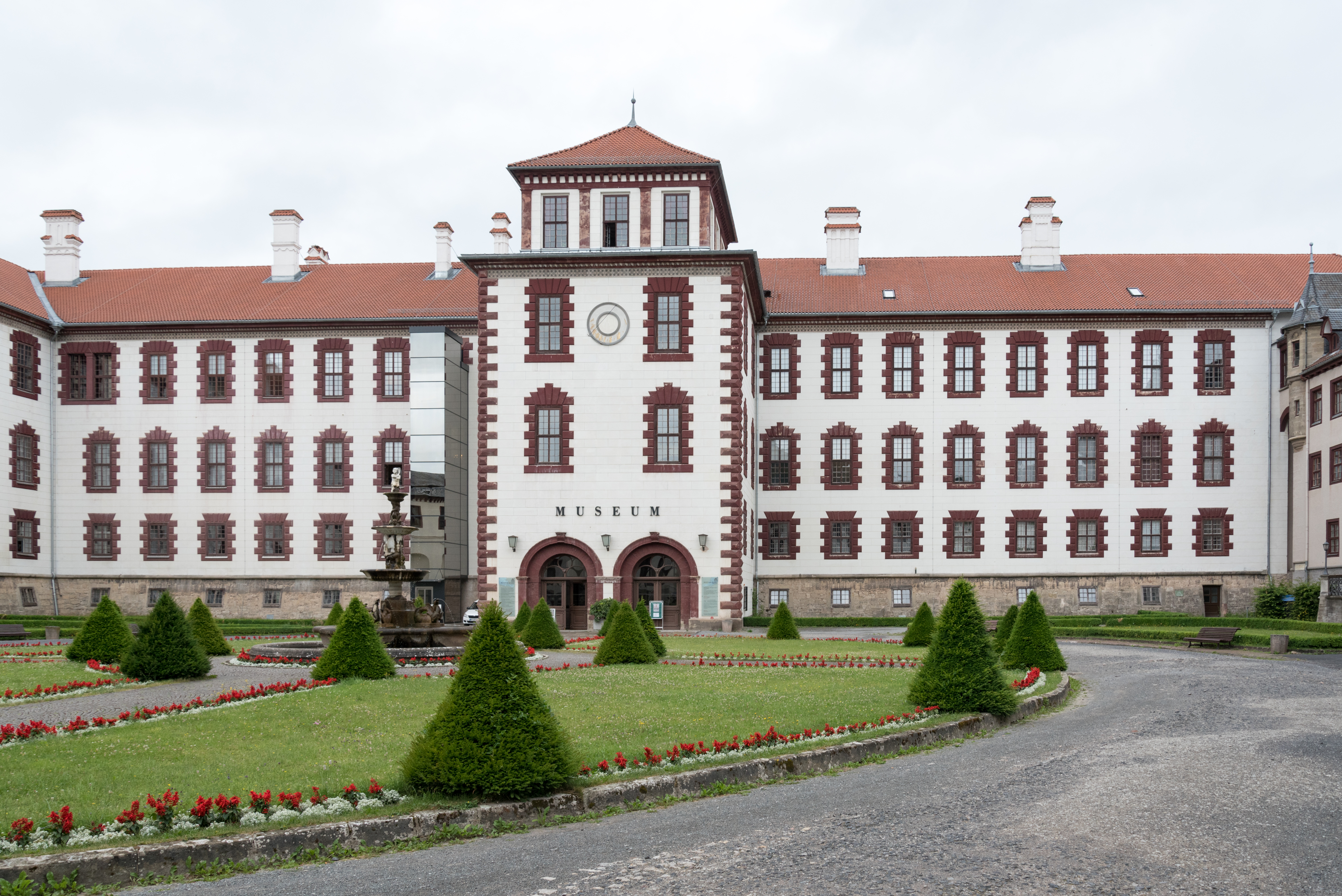 Meiningen, Schloss Elisabethenburg, Exterior